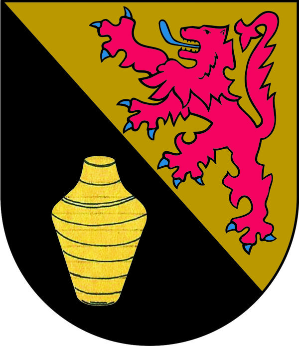 Wappen von Schauren (Hunsrück)